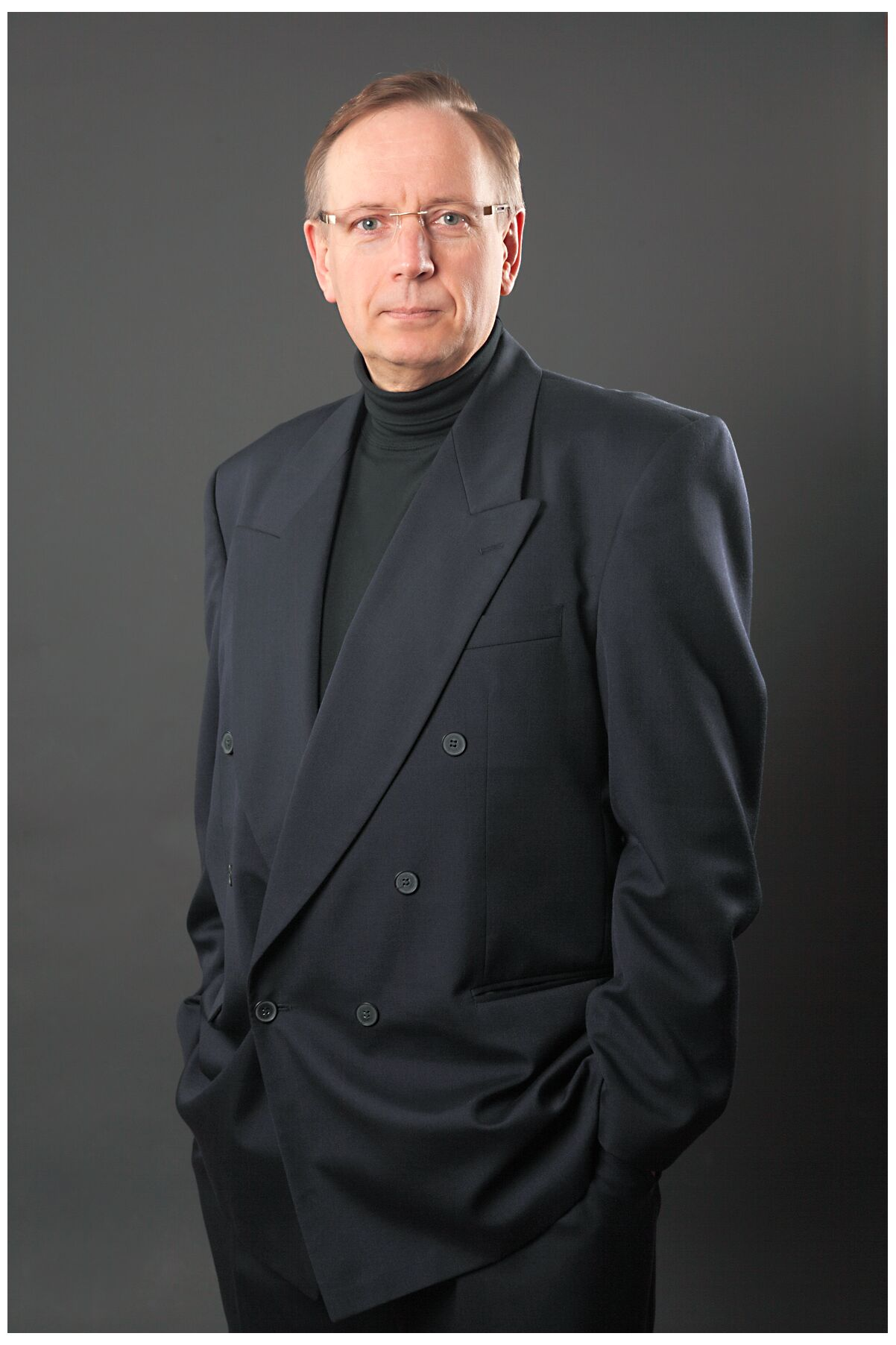 Buch- und Romanautor Jürgen Hoops von Scheeßel, Oktober 2010